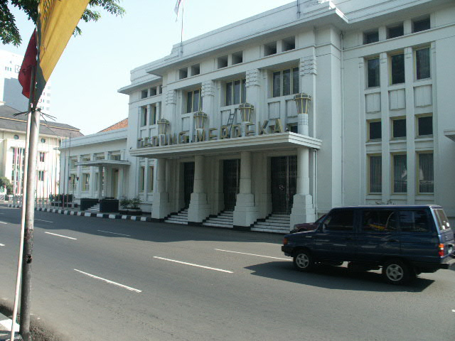 Gudung Merdeka gebouw